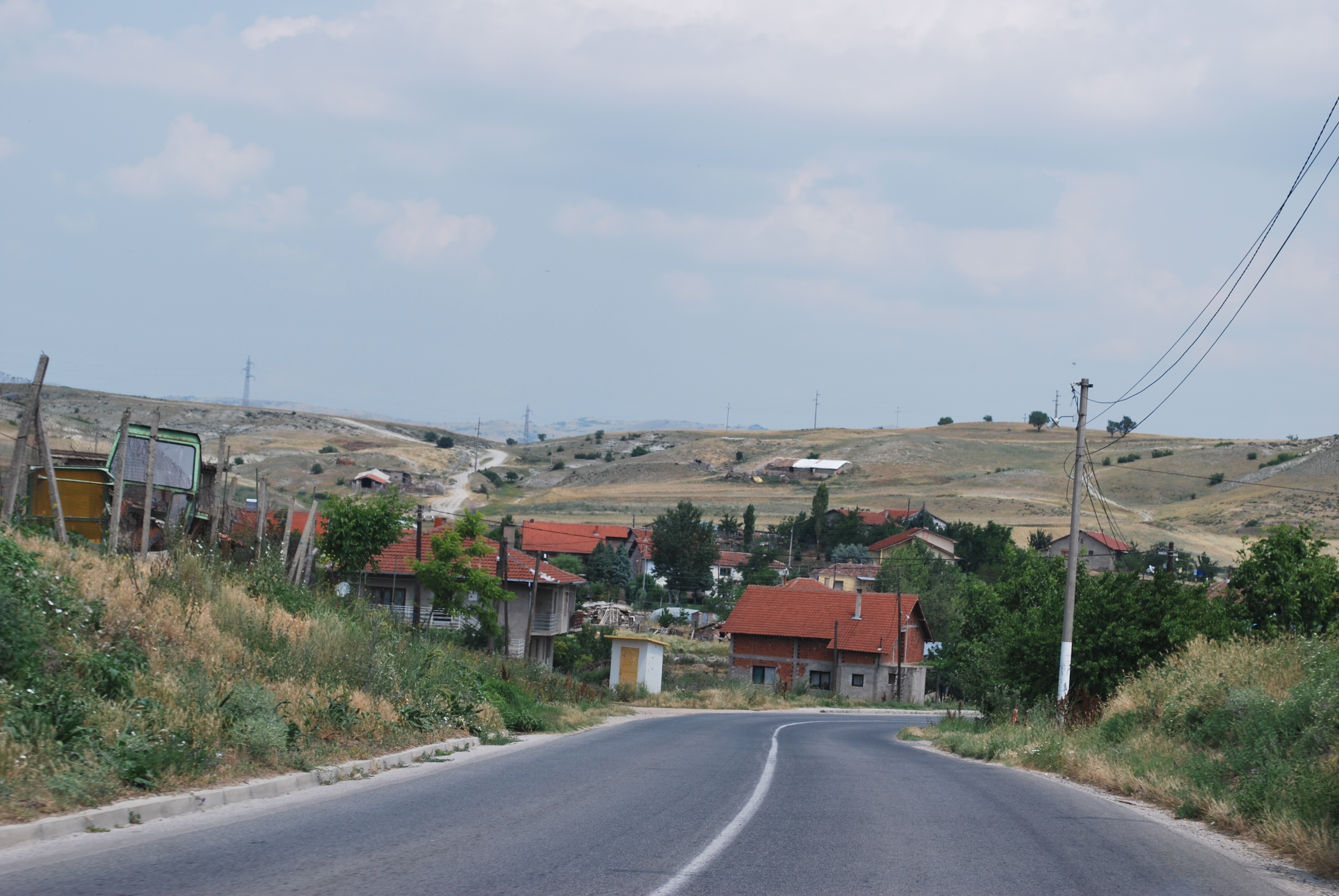 Čardaklija, Macedonia